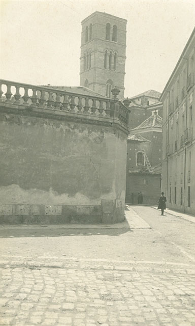 Iglesia de San Martín por detrás - Valladolid - Postal Color